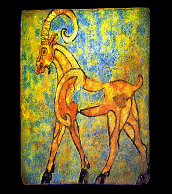 izertu,iran-bukan,2002 Japan (image)